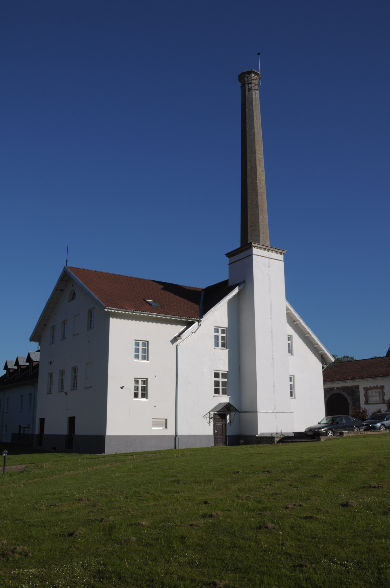 Hotell Palmse Park